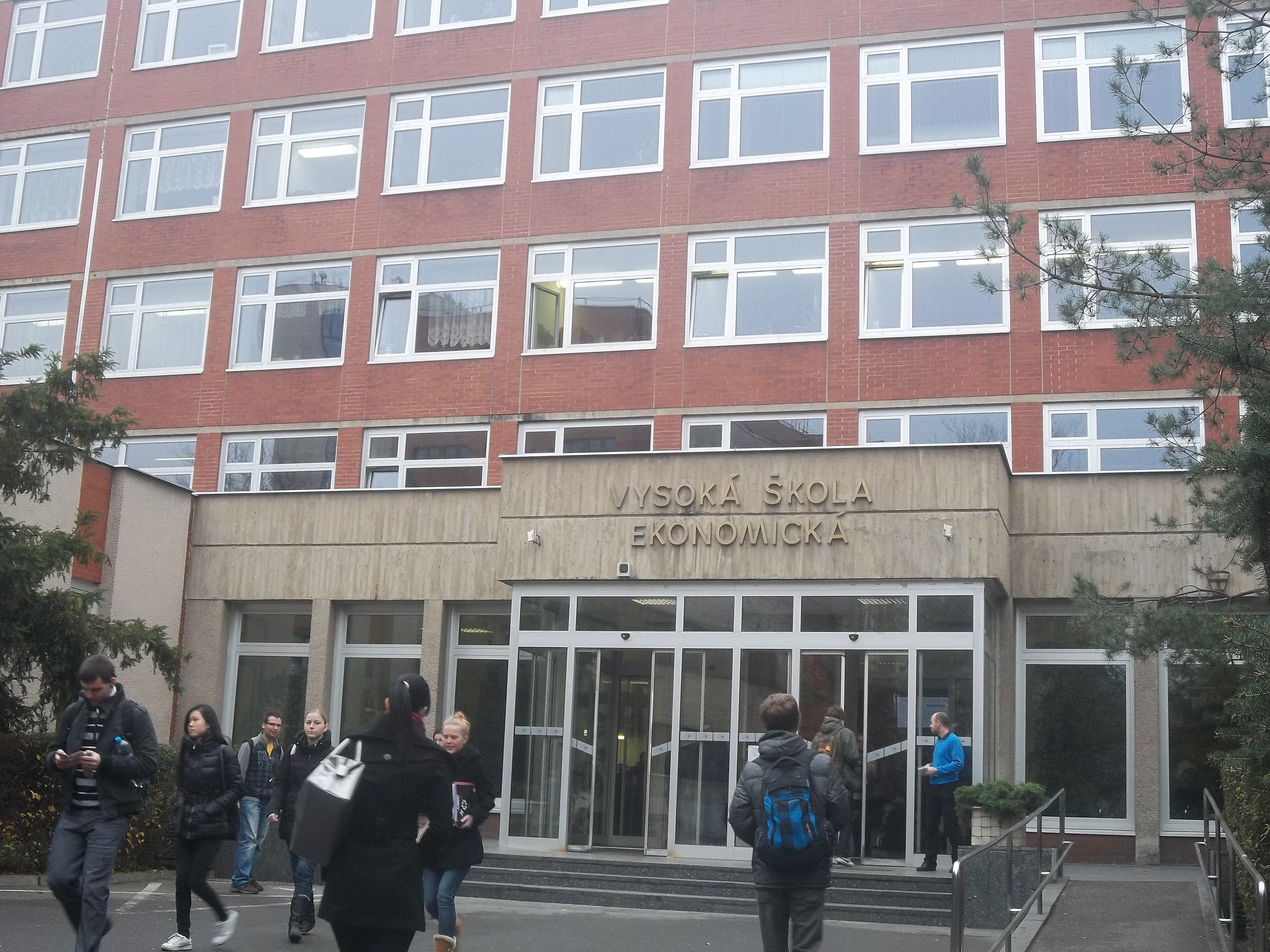 Bâtiment le plus récent du campus de l'école supérieure d'économie de Prague. Il s'agit du bâtiment Rajska